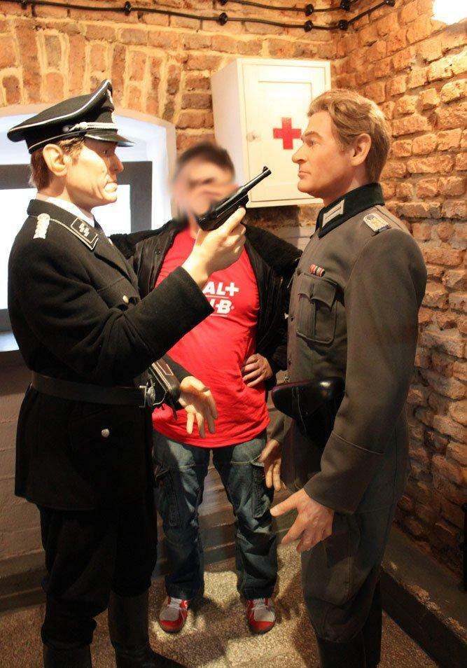 Odłóż tę pukawkę durniu!!!